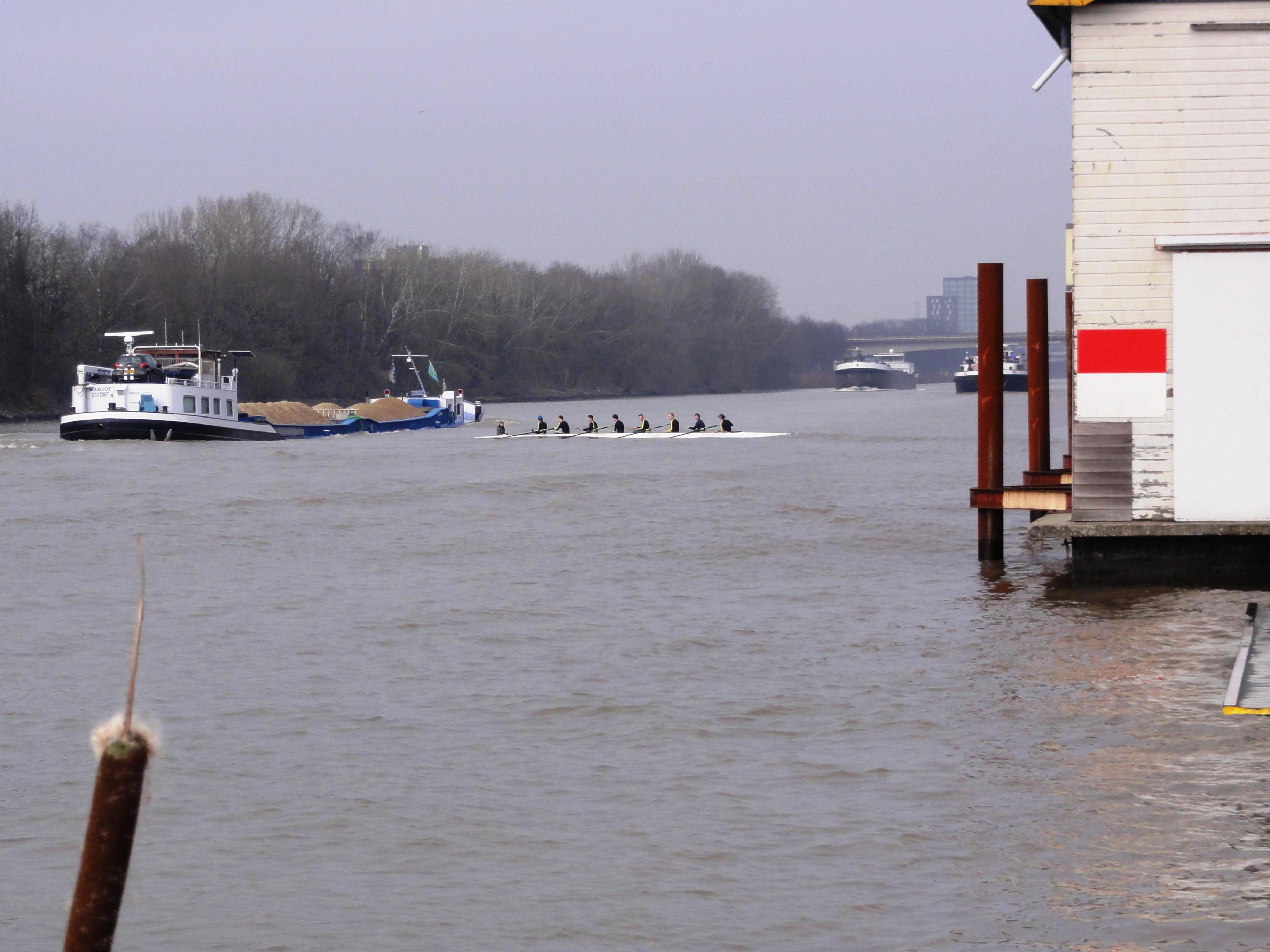 Nijmegen, een der roeiers-acht ploegen bij Phocas botenhuis op Maas-Waalkanaal tussen druk scheepvaartverkeer